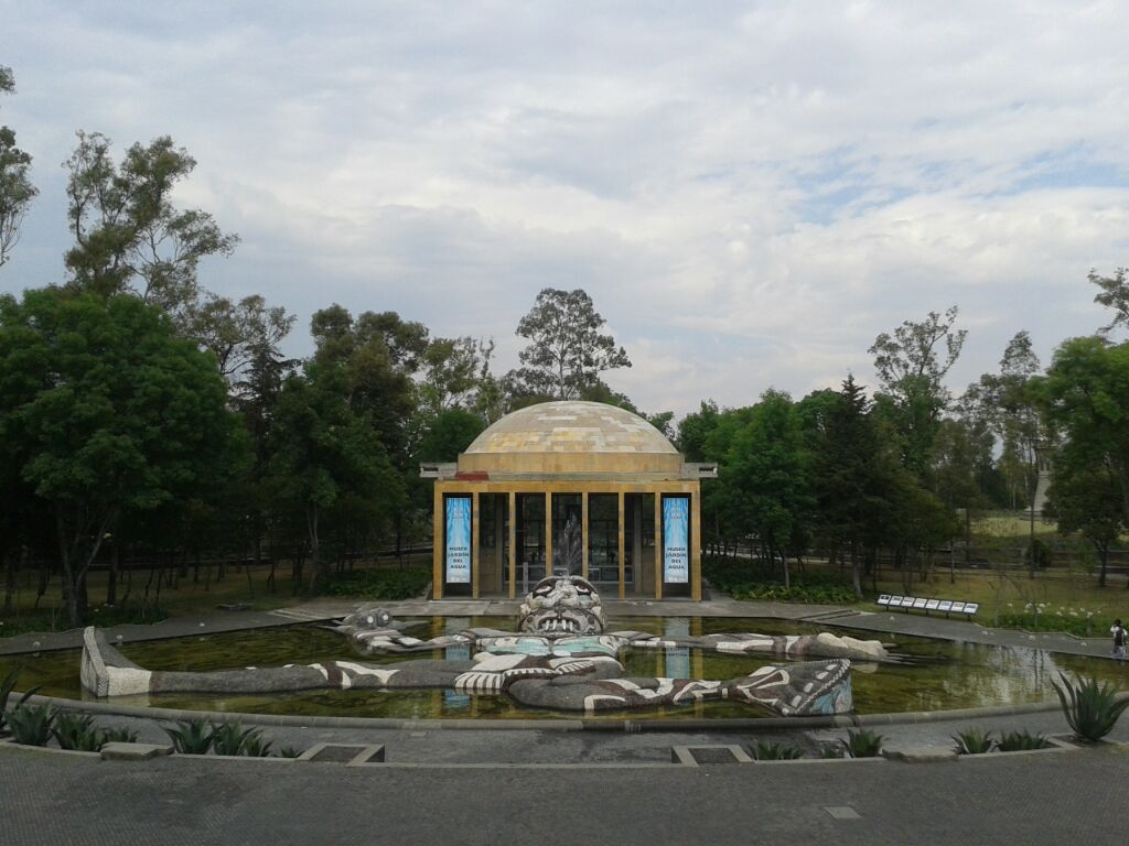 Esta es la imagen de Tlaloc que se encuentra en la parte de afuera de lo que en algún momento fue el acueducto que abastecía a la ciudad y donde se encuentra el mural de Diego Rivera: "El agua origen de la vida"